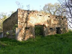 Kąty (powiat brzeski) - ruiny spichlerza z XVI wieku